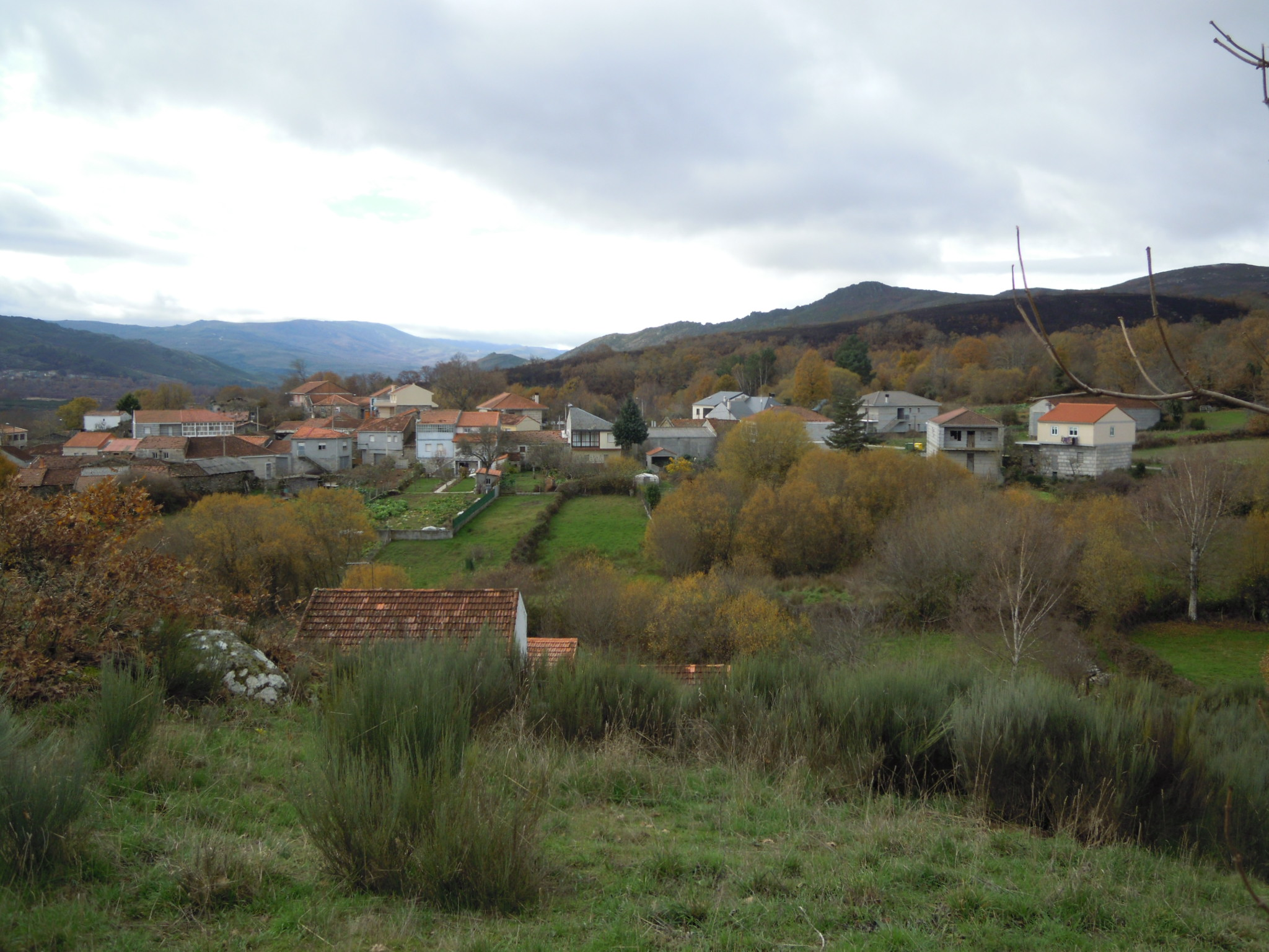 Vista xeral da aldea de Tosende (Baltar).